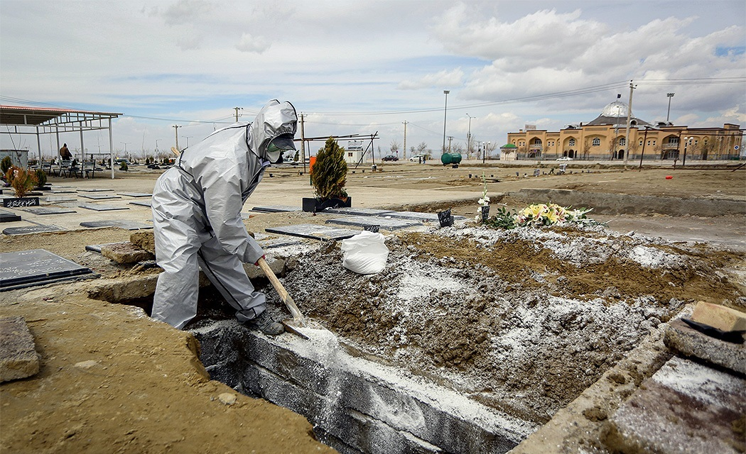 "خانه ابدی" متوفیان کرونا در همدان